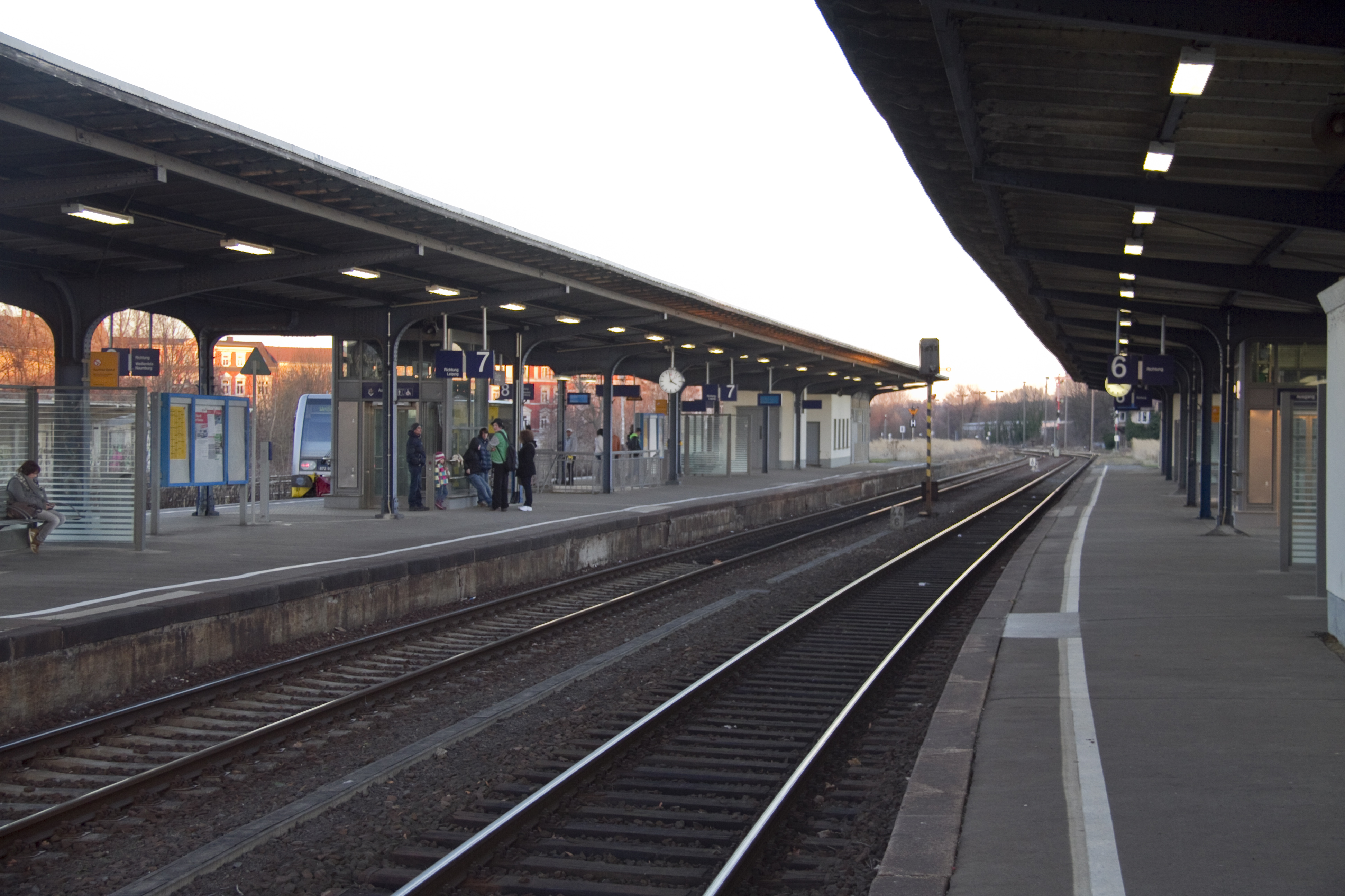 Bahnhof Zeitz, Bahnsteige